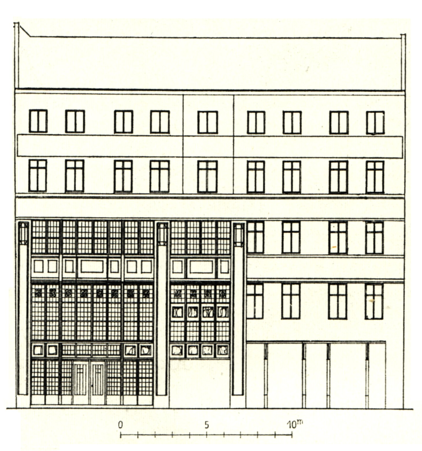 Berlin - Weinhaus Rheingold, Fassade an der Potsdamerstraße